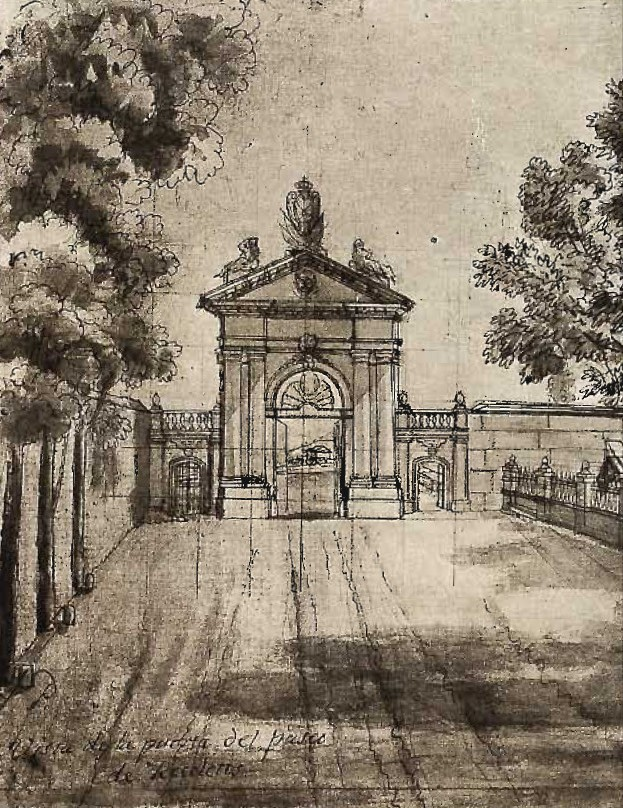 Plano de Madrid en el siglo XVII. Detalle de la Puerta de Toledo